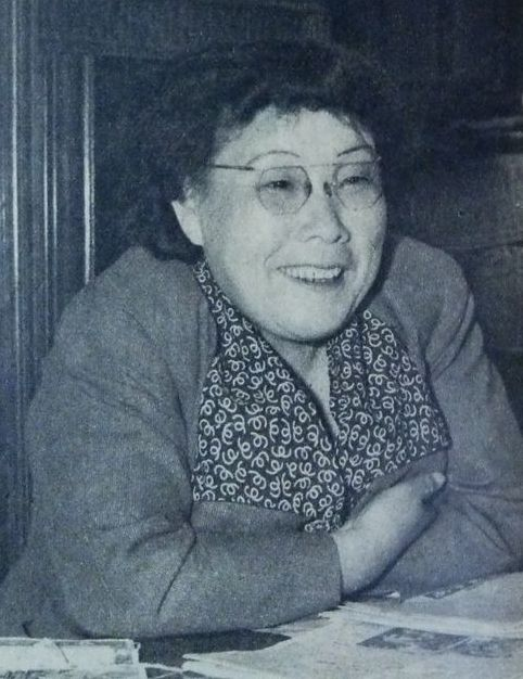 大石ヨシエ（日本初の女性代議士の一人）